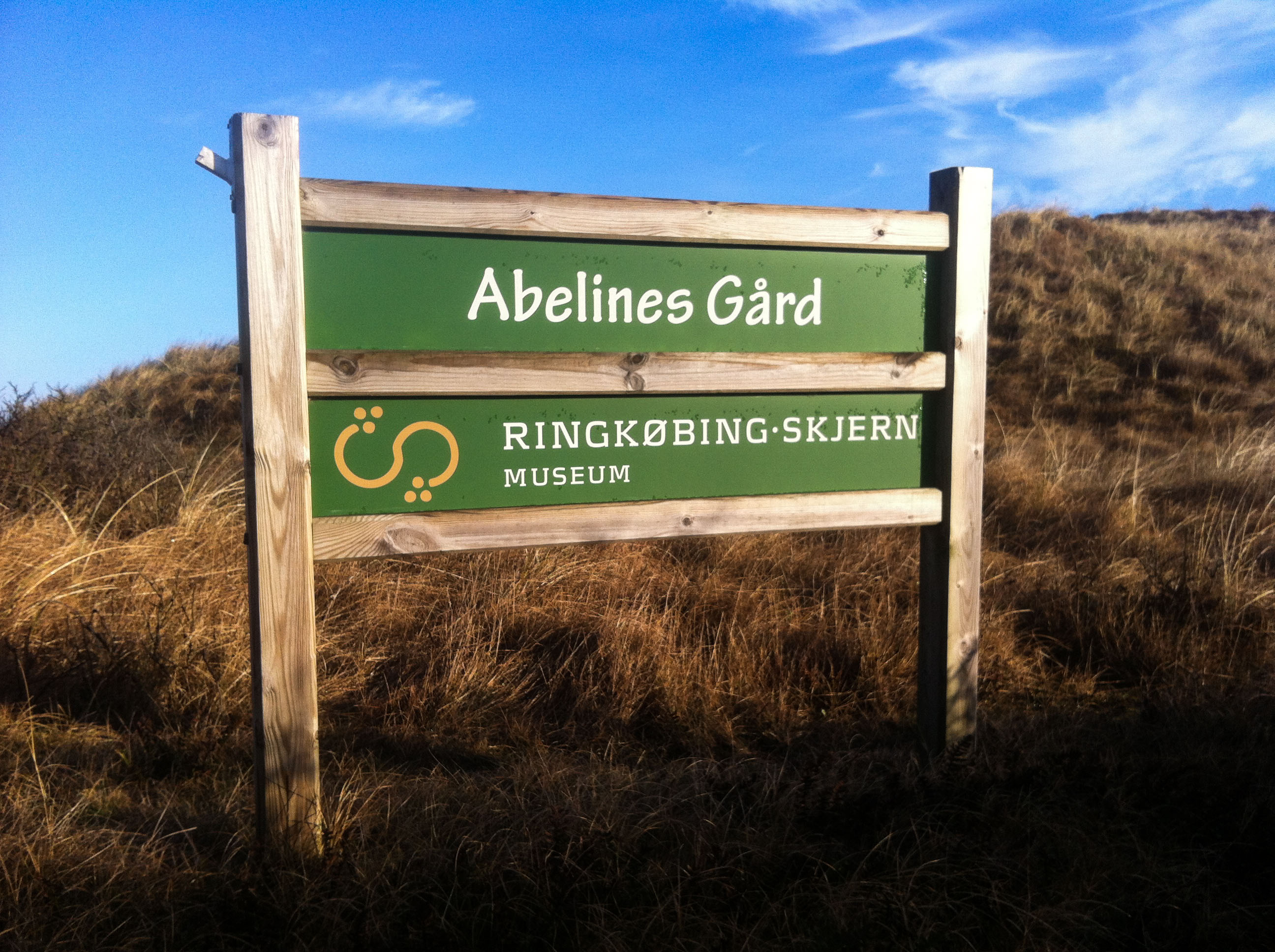 Hinweisschild Museum Abelines Gaard